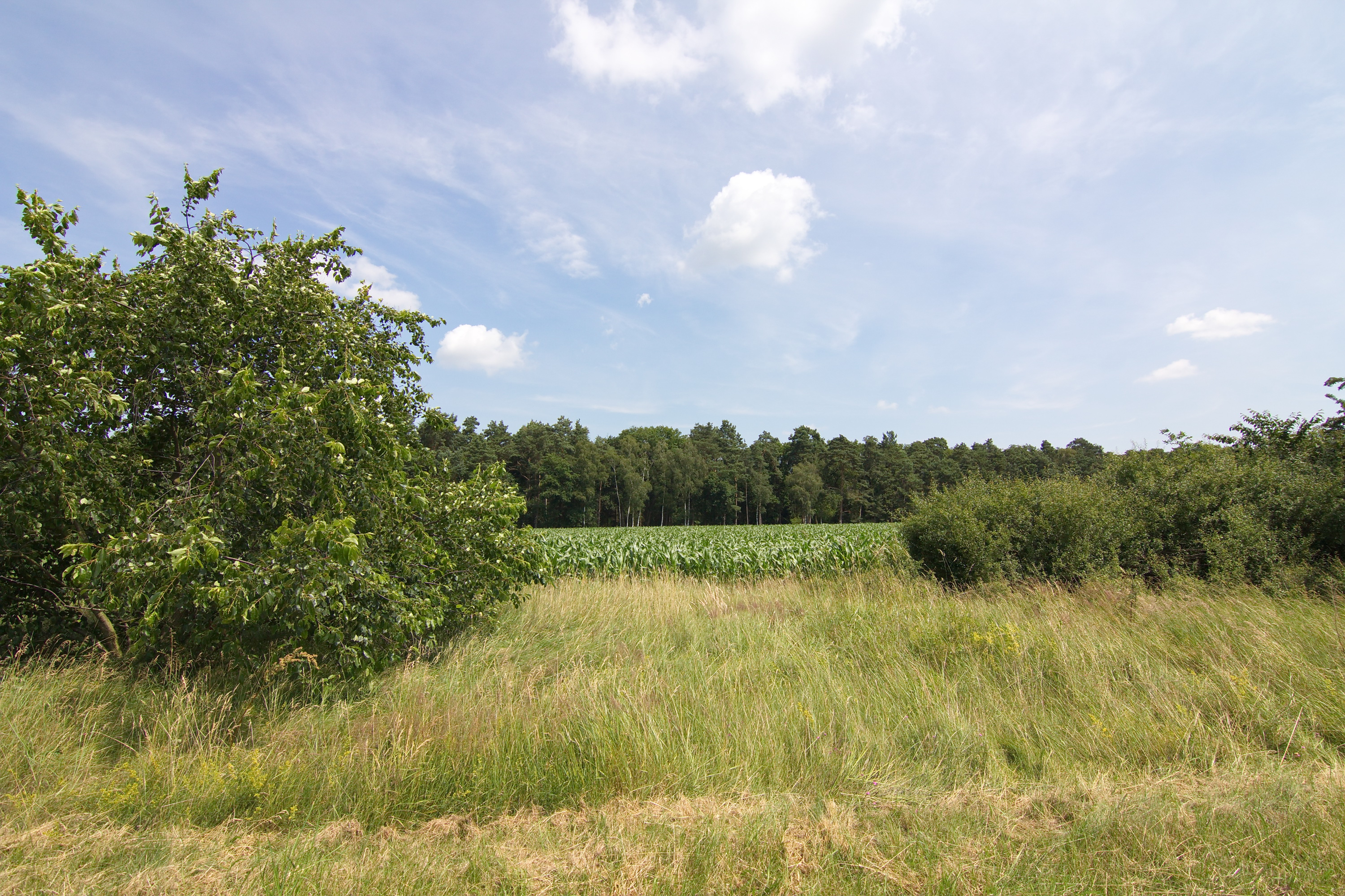 Vogelschutzgebiet Untere Allerniederung in Niedersachsen, Deutschland